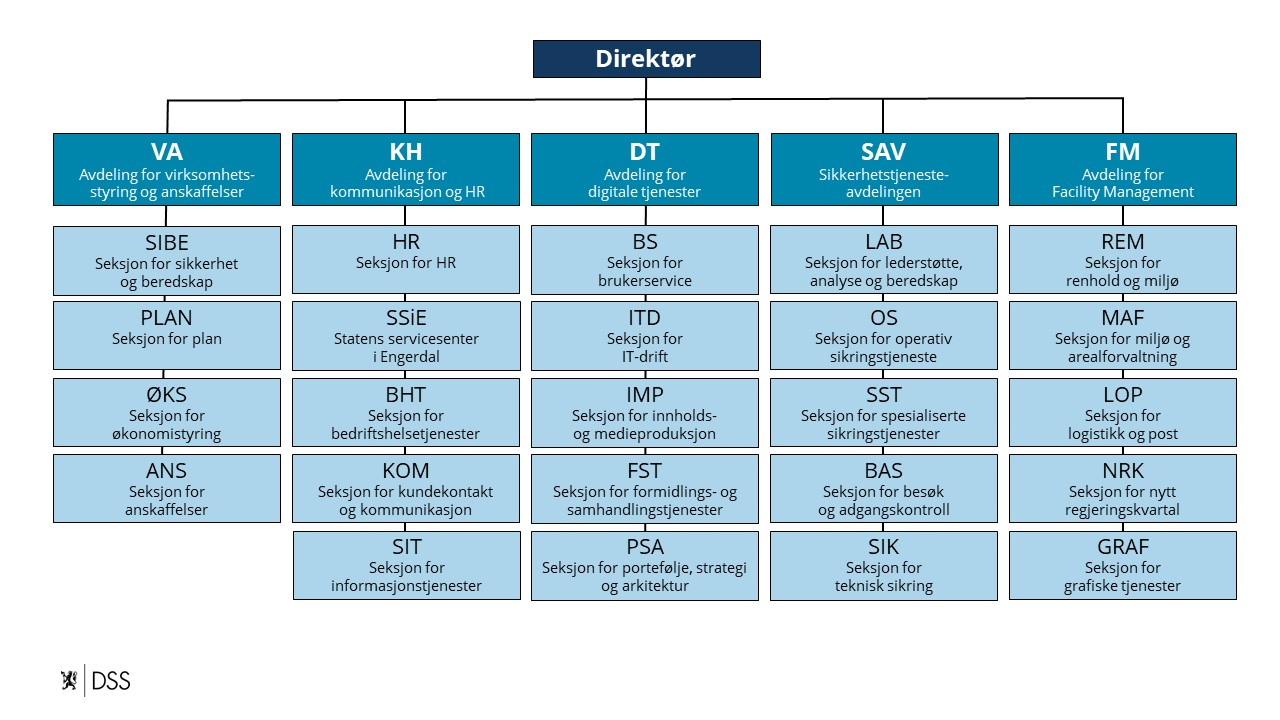 Organisasjonskart for Departementenes sikkerhets- og serviceorganisasjon